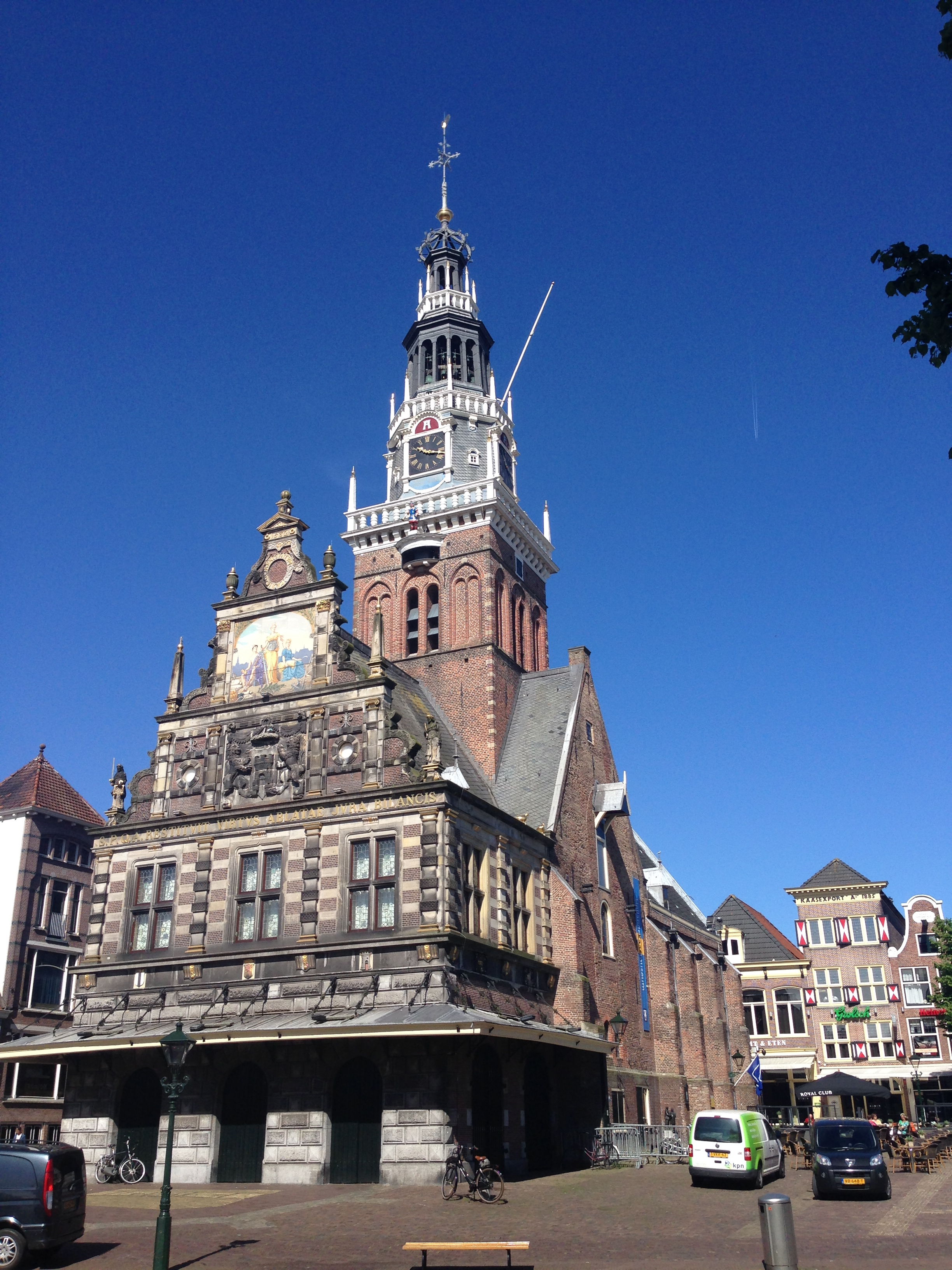 Alkmaar, Waag en kaasmuseum. Ooit kapel.